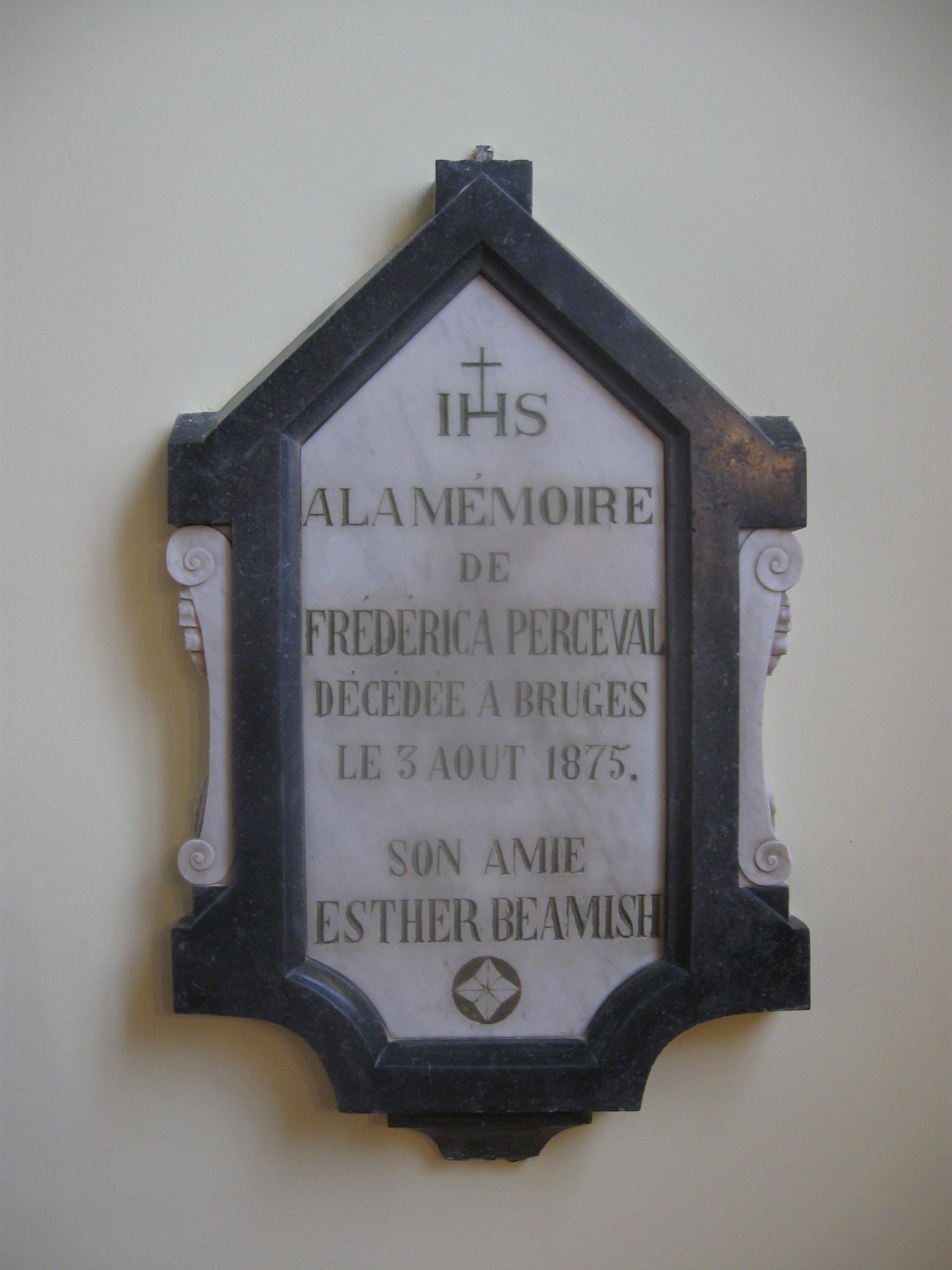 Stèle à la mémoire de Frédérica Perceval, placée à l'entrée de la nef de l'église protestante de Spa